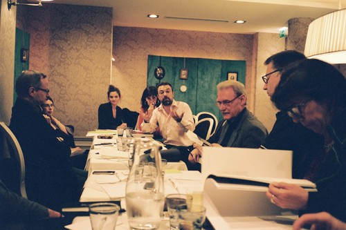 Réunion du comité scientifique du FILAF à Paris en 2012